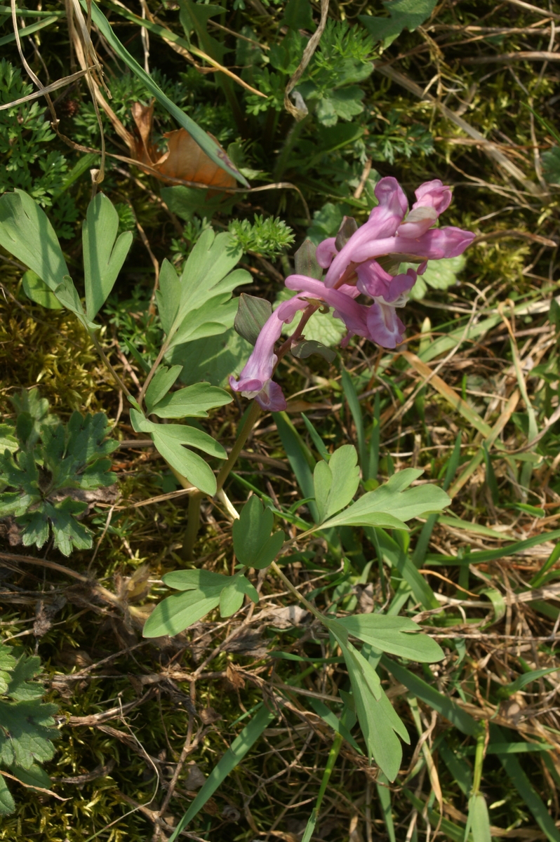 Votli petelinček v Selu.